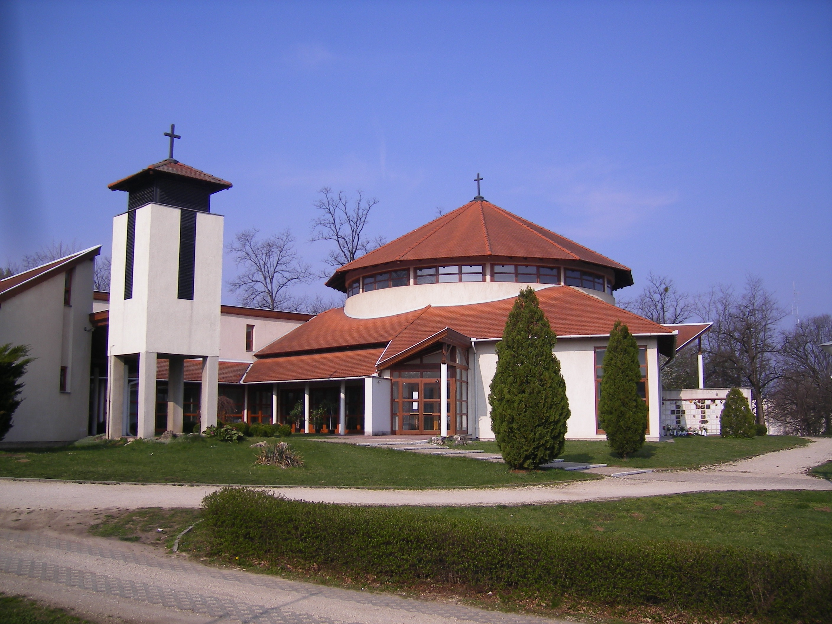 Oroszlány - Munkás Szent József római katolikus